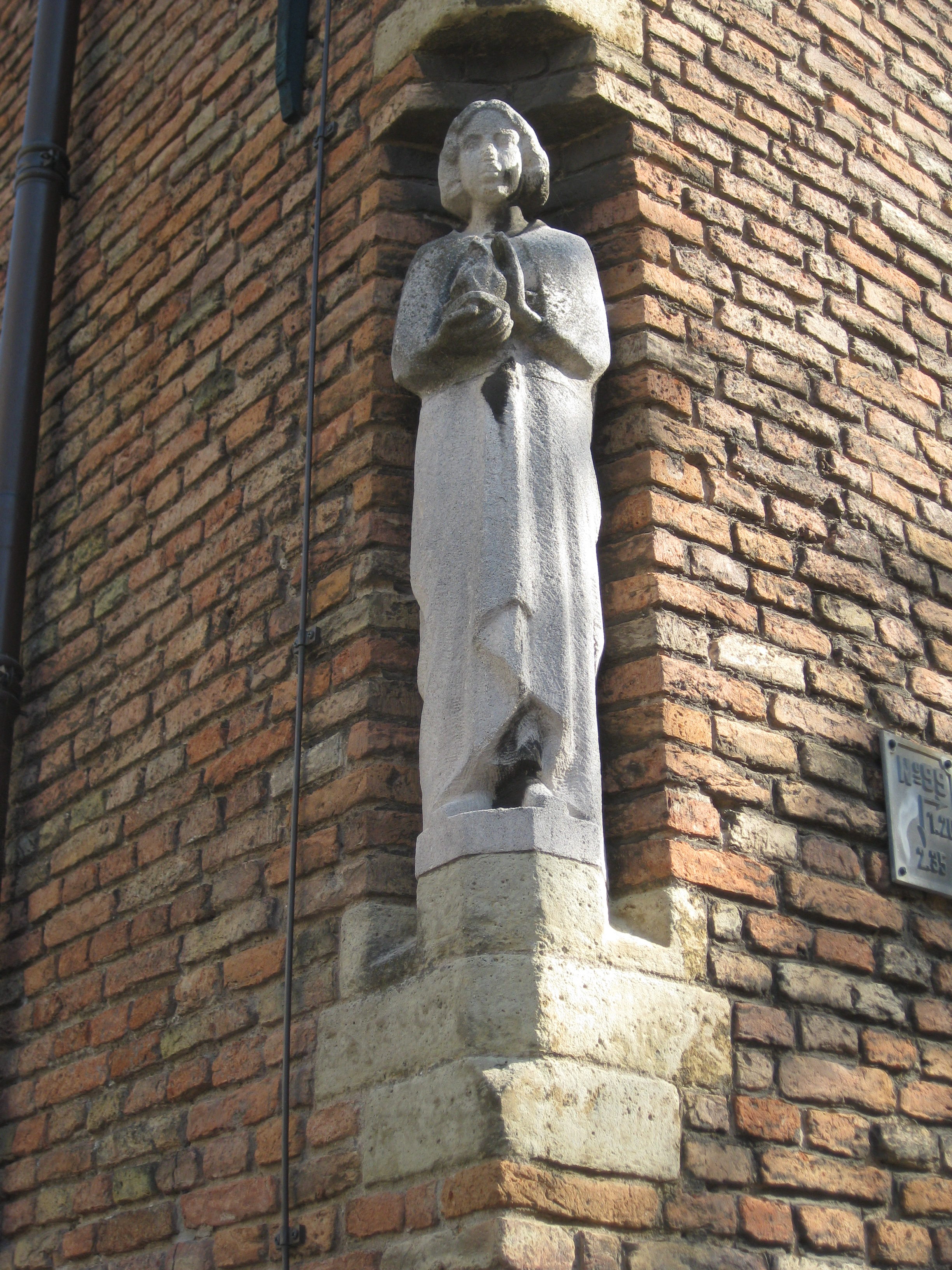 Vrouw met vlam, beeld van Henk Etienne, 1930. Hoek St.Hippolytuskapel, Oude Delft/Nieuwstraat, Delft.